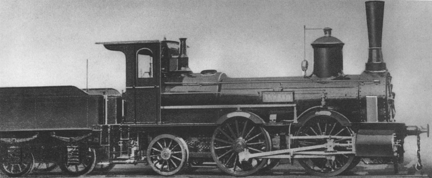 Dampflokomotive Mecklenburgische Wodan.